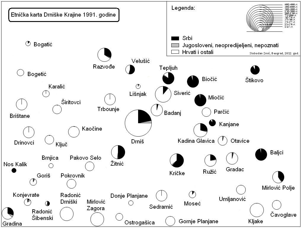 Етничка карта Дрнишке крајине